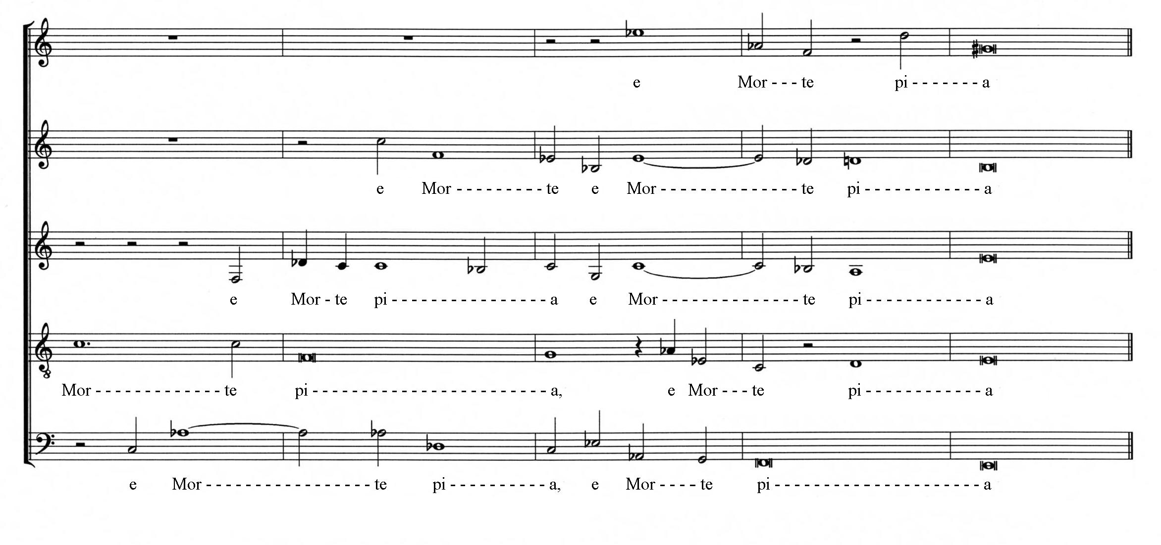 Gesualdo VI Madrgal 9